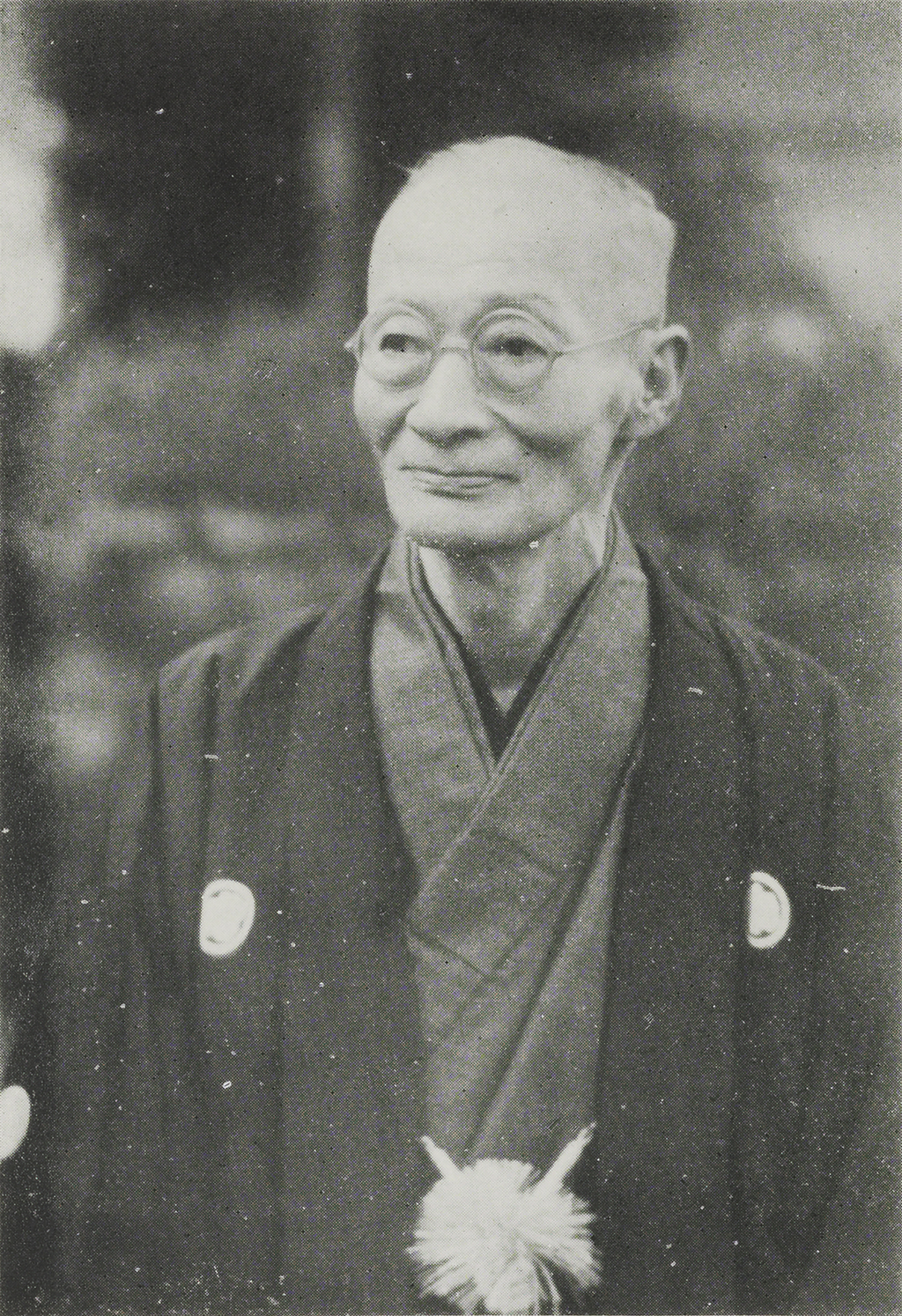 Portrait of Nakashima Moritoshi (中島守利, 1877 – 1952)